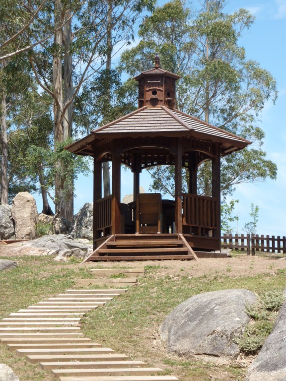 Vista do cenador de San Roque, Ribeira, Galiza